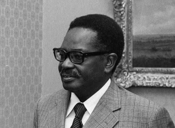 President MPLA, heer Neto door Den Uyl ontvangen; premier Den Uyl en A. Neto (r)